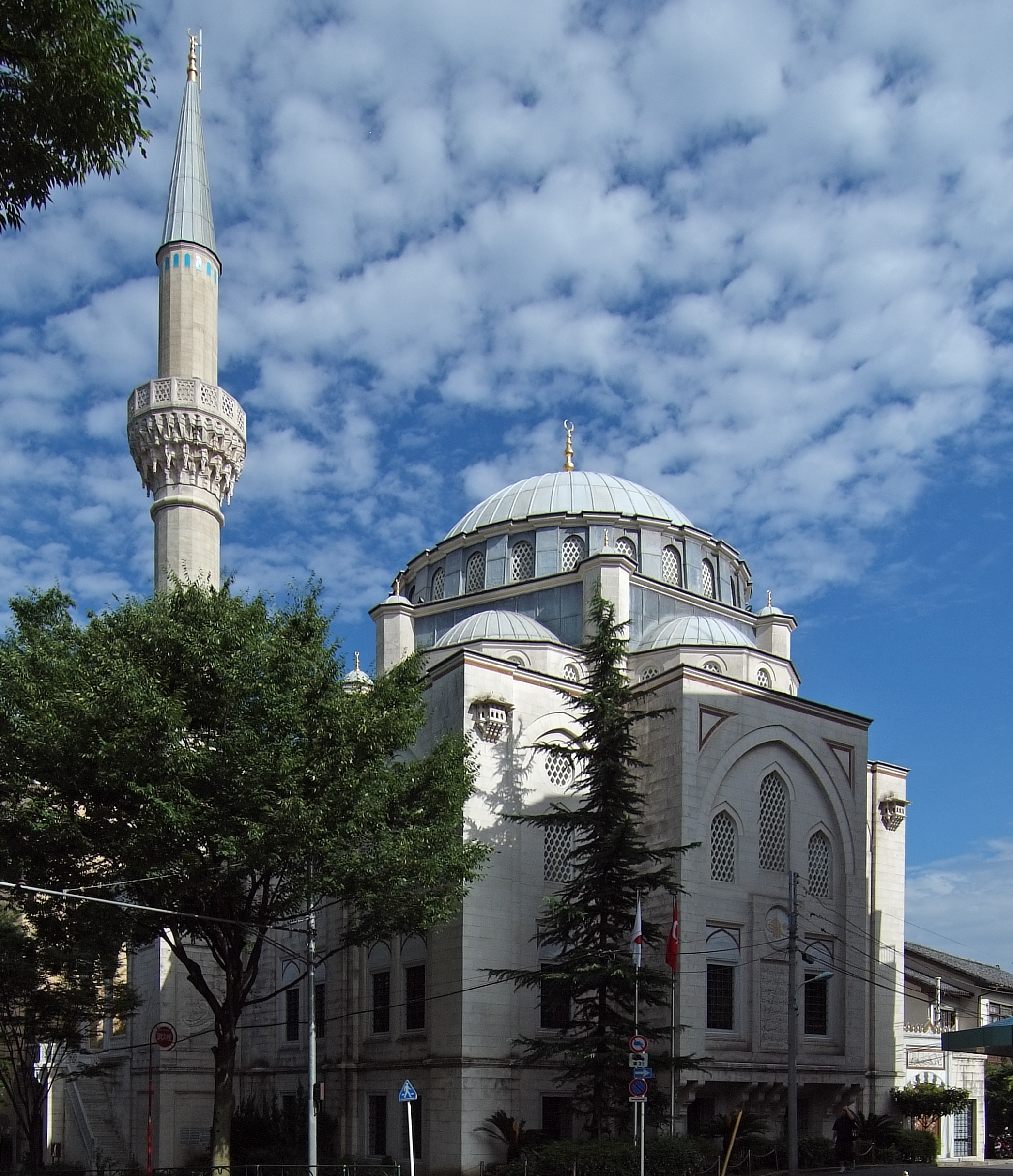 Tokyo Camii, at Shibuya-ku Tokyo Japan. Photo Edited by Photoshop.